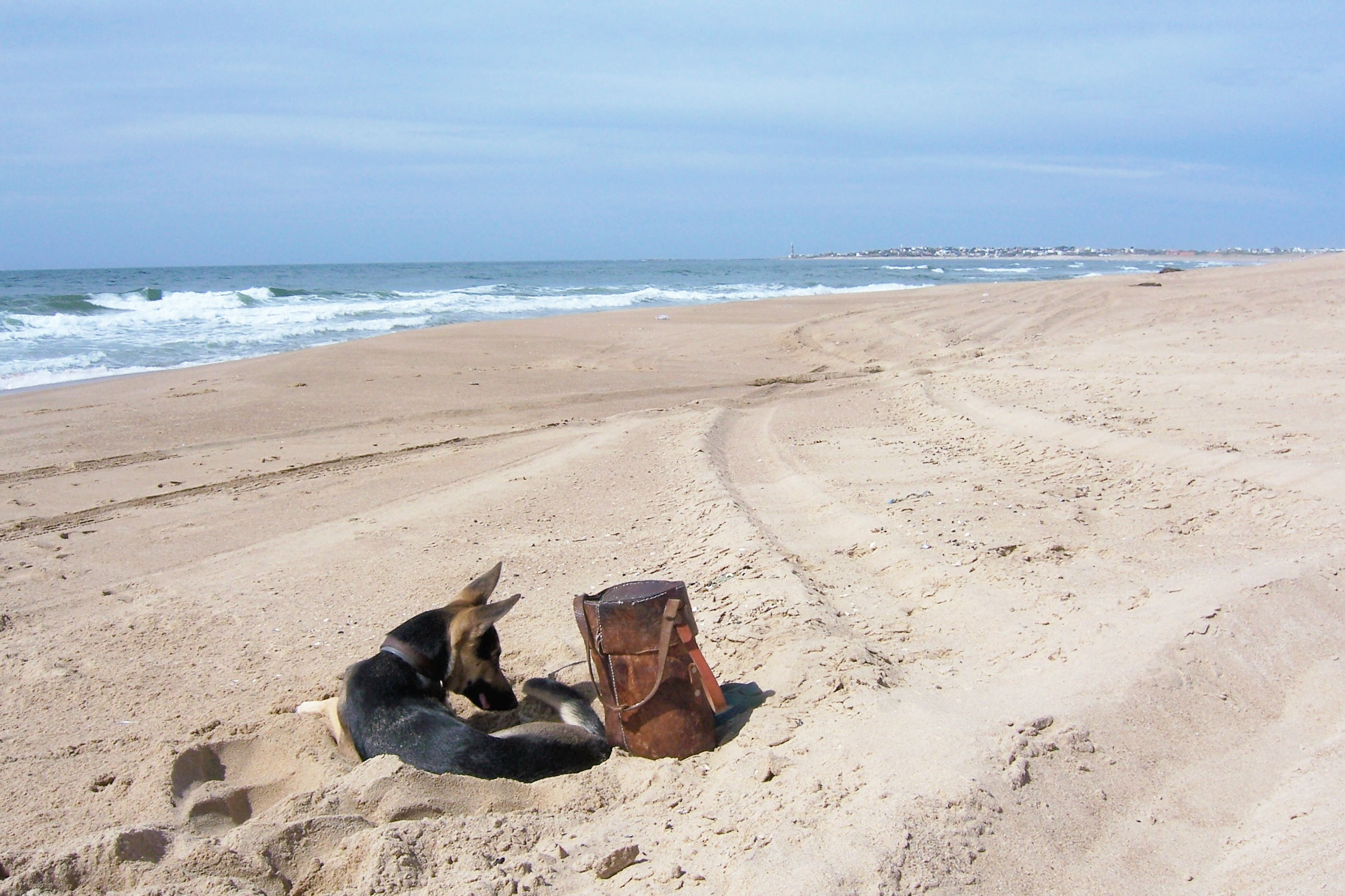 José Ignacio, Uruguay. Vista de este a oeste, se aprecia el Océano Atlántico hacia el sur (zona izquierda de la foto).